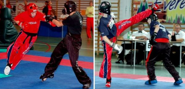 kick boxing techniki walki